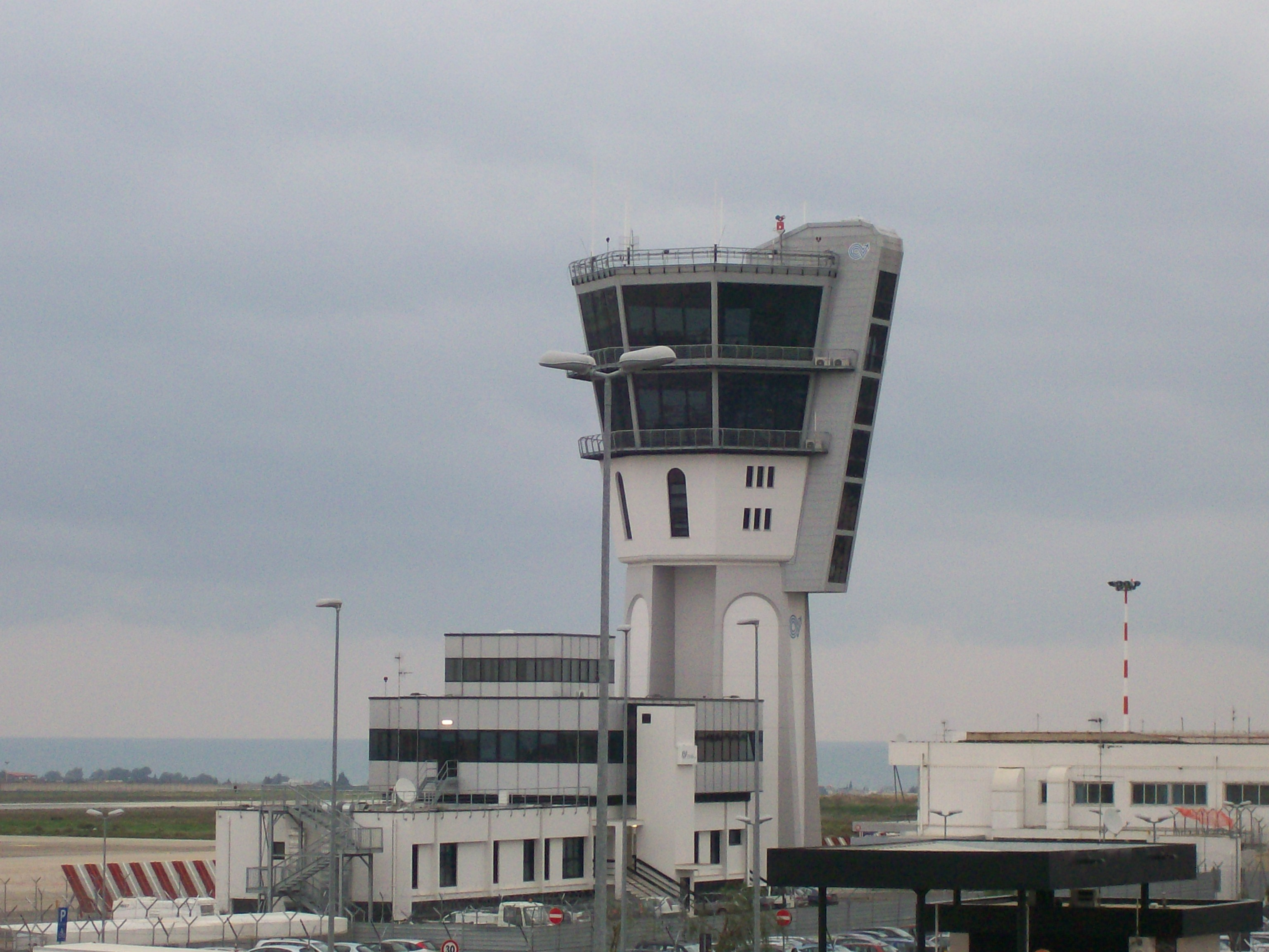 bari airport control tower, torre di controllo